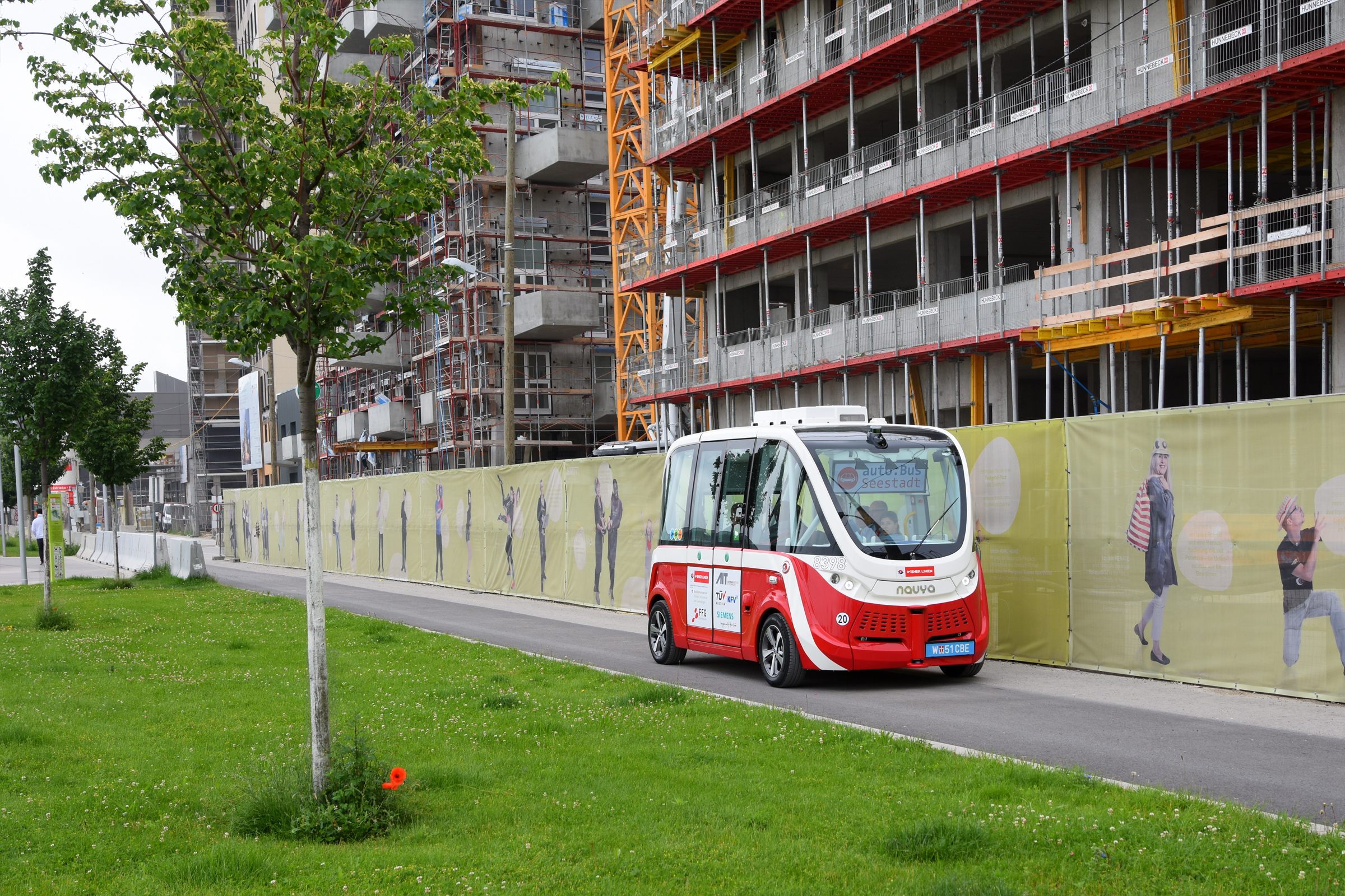 Navya Arma Nr. 8398 der Wiener Linien als "auto.Bus-Seestadt" in der Janis-Joplin-Promenade.